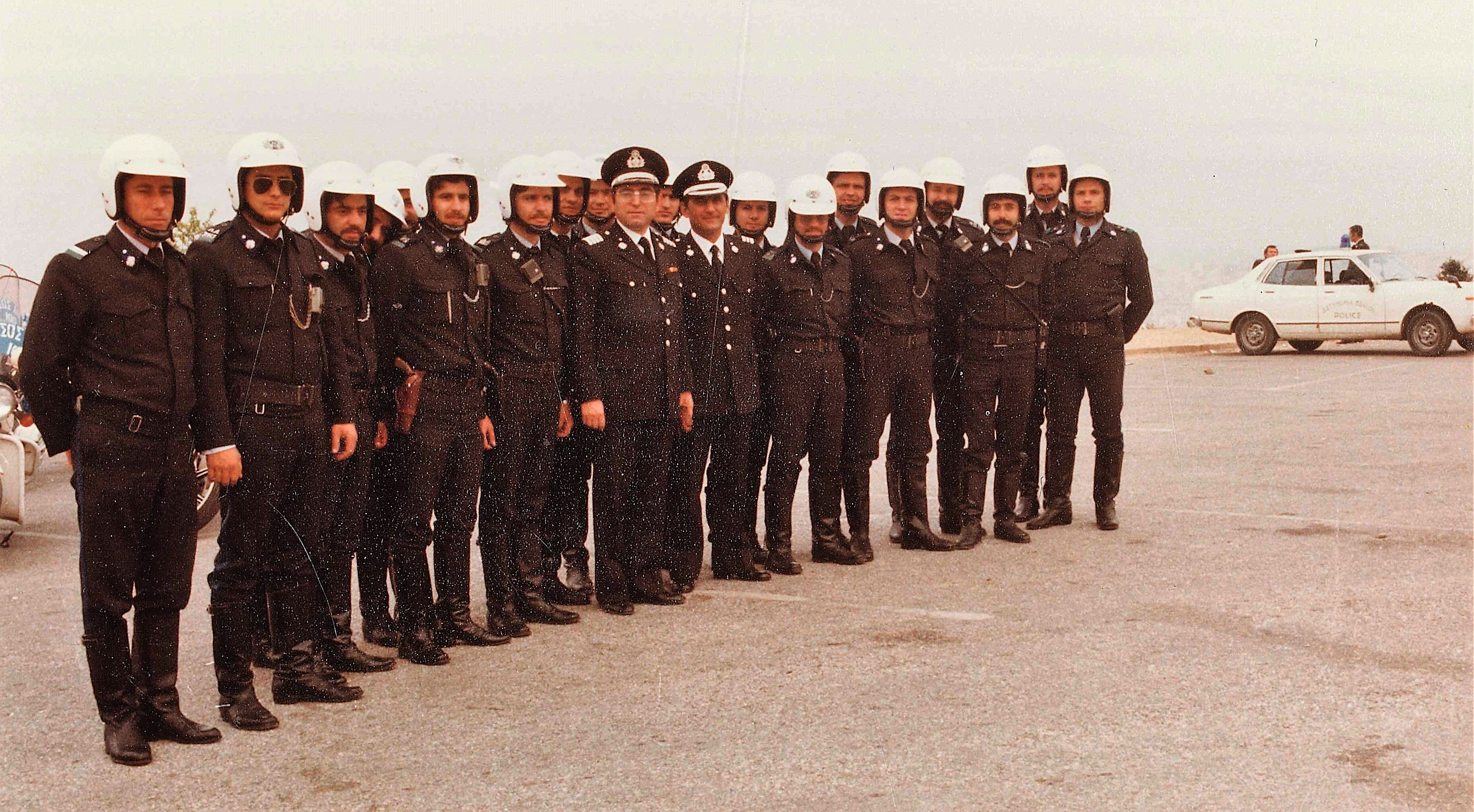 Η αρχική Ομάδα Ζ με τον ιδρυτή της Μανώλη Φραγκ. Σηφάκη